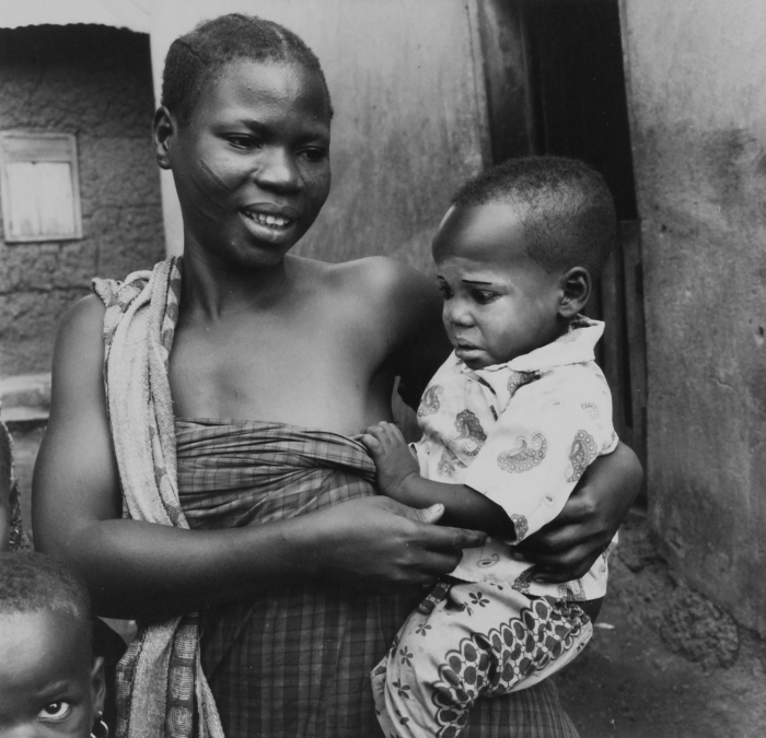 Het gezicht van het kind is beschilderd. Uitzoeken ter gelegenheid waarvan: besnijdenis?